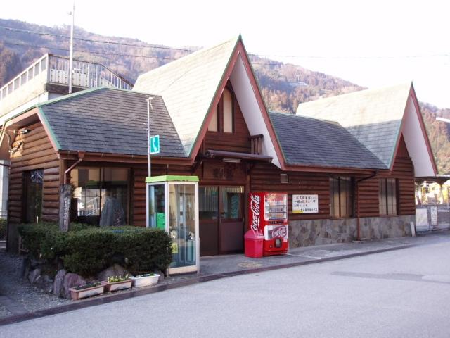 Shikoku Railway Dosan Line Toyonaga Station 四国旅客鉄道 土讃線 豊永駅 駅名標